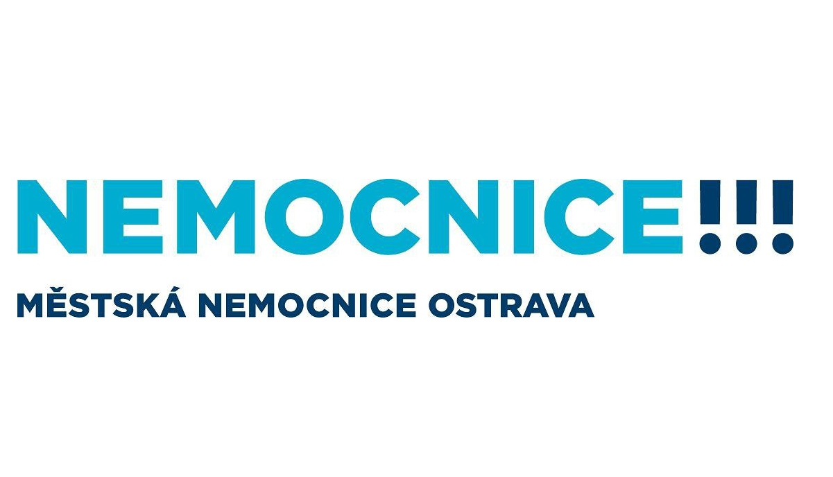 Logo Městské nemocnice Ostrava